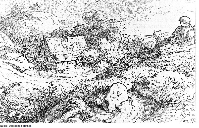 Original image description from the Deutsche Fotothek Dresden-Loschwitz. Zeibig-Mühle, Zeichnung von Ludwig Richter